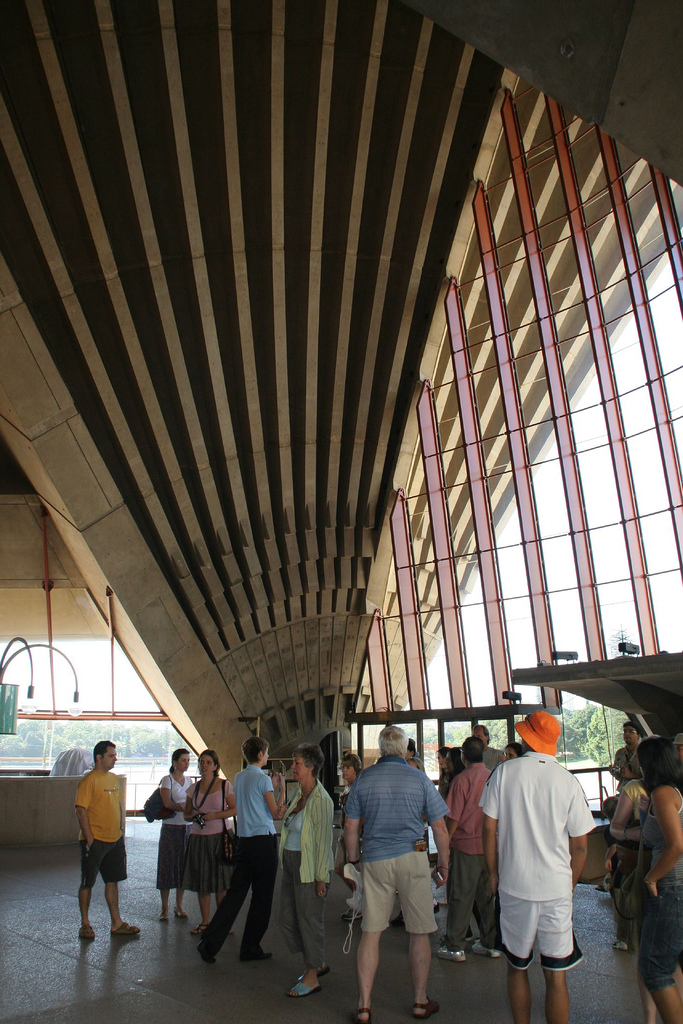 Sistema de vigas en abanico de las bóvedas de la Ópera House de Sydney